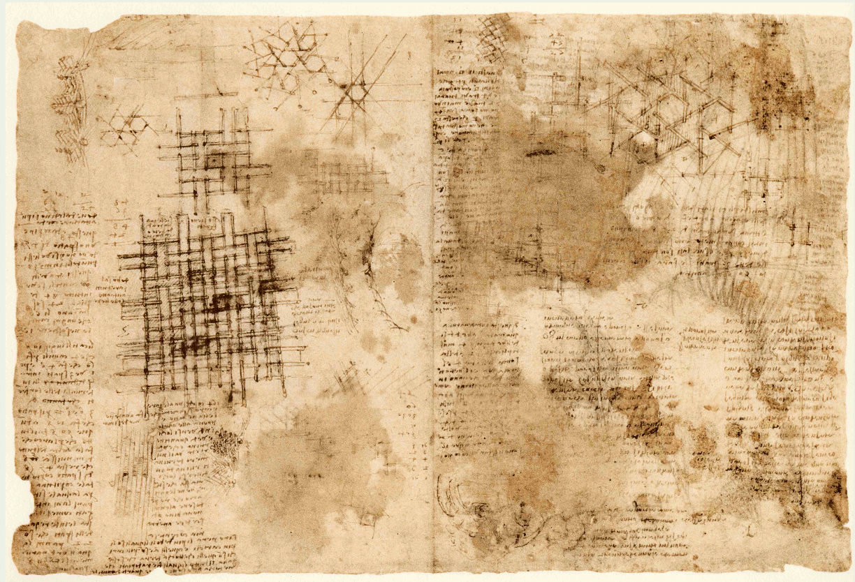 En aquest full del Codex Atlantico, Leonardo dibuixa unes estructures de pals que se sostenen mútuament. Amb aquestes estructures és possible cobrir una gran llum amb elements de suport molt més curts.